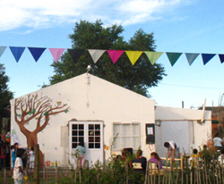 casita